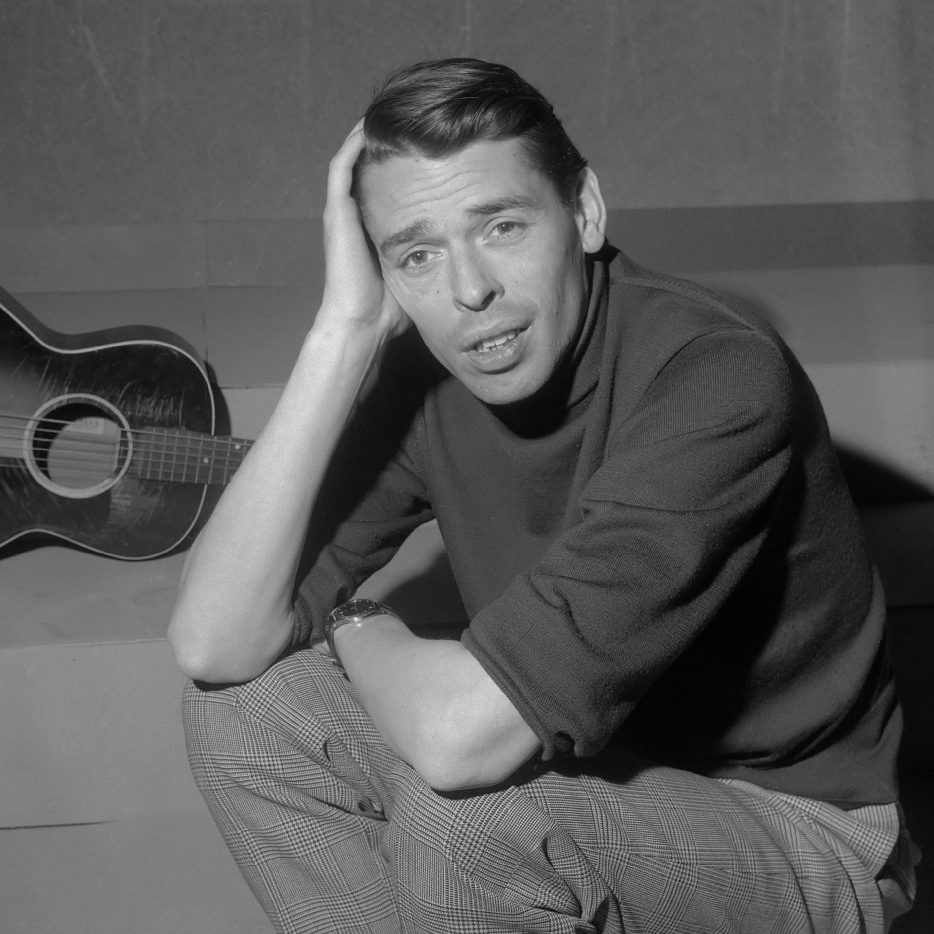 Jacques Brel in TV-programma Domino 21 maart 1962